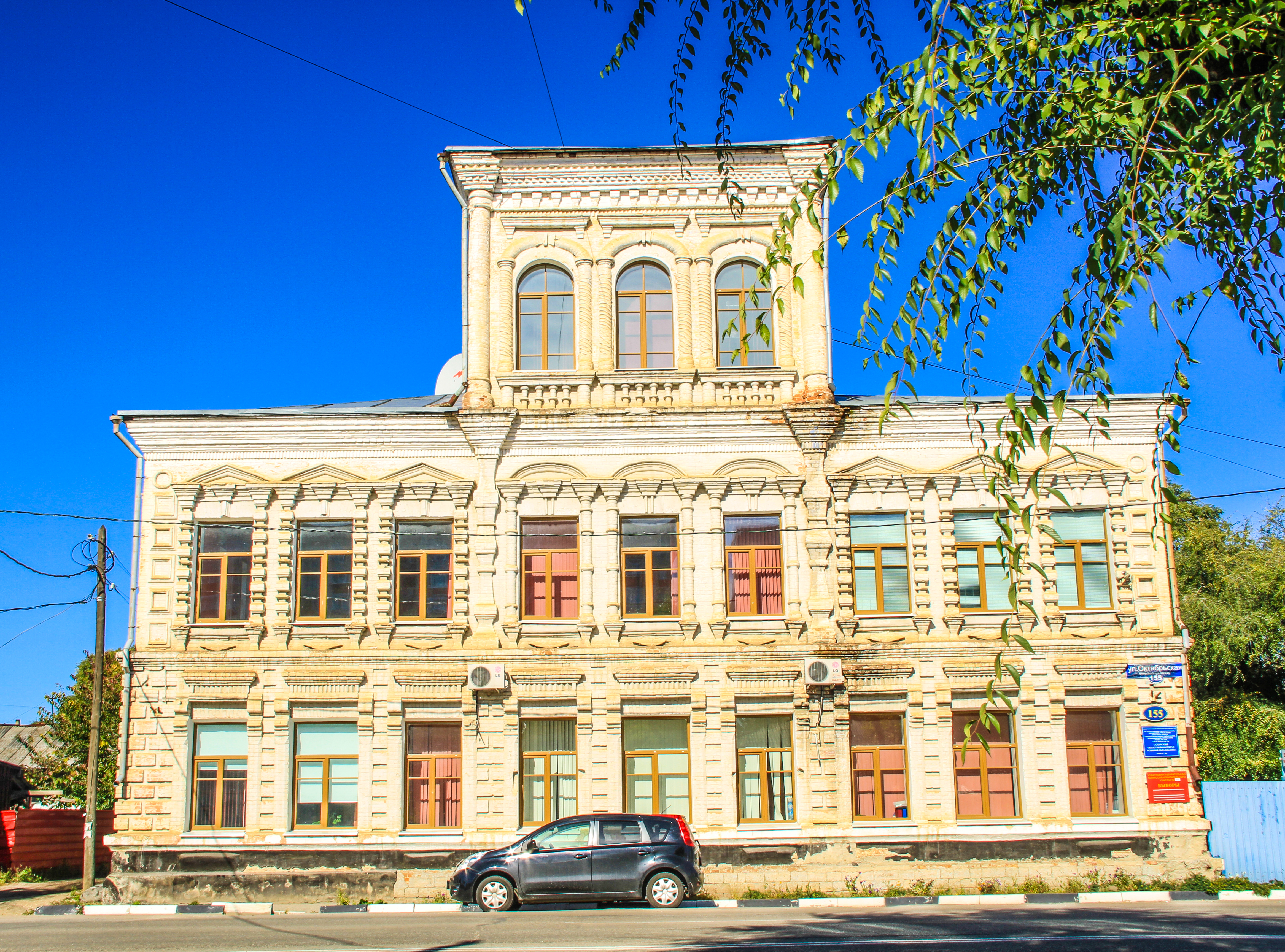 Здание: улица Октябрьская, 155, Благовещенск, Амурская область